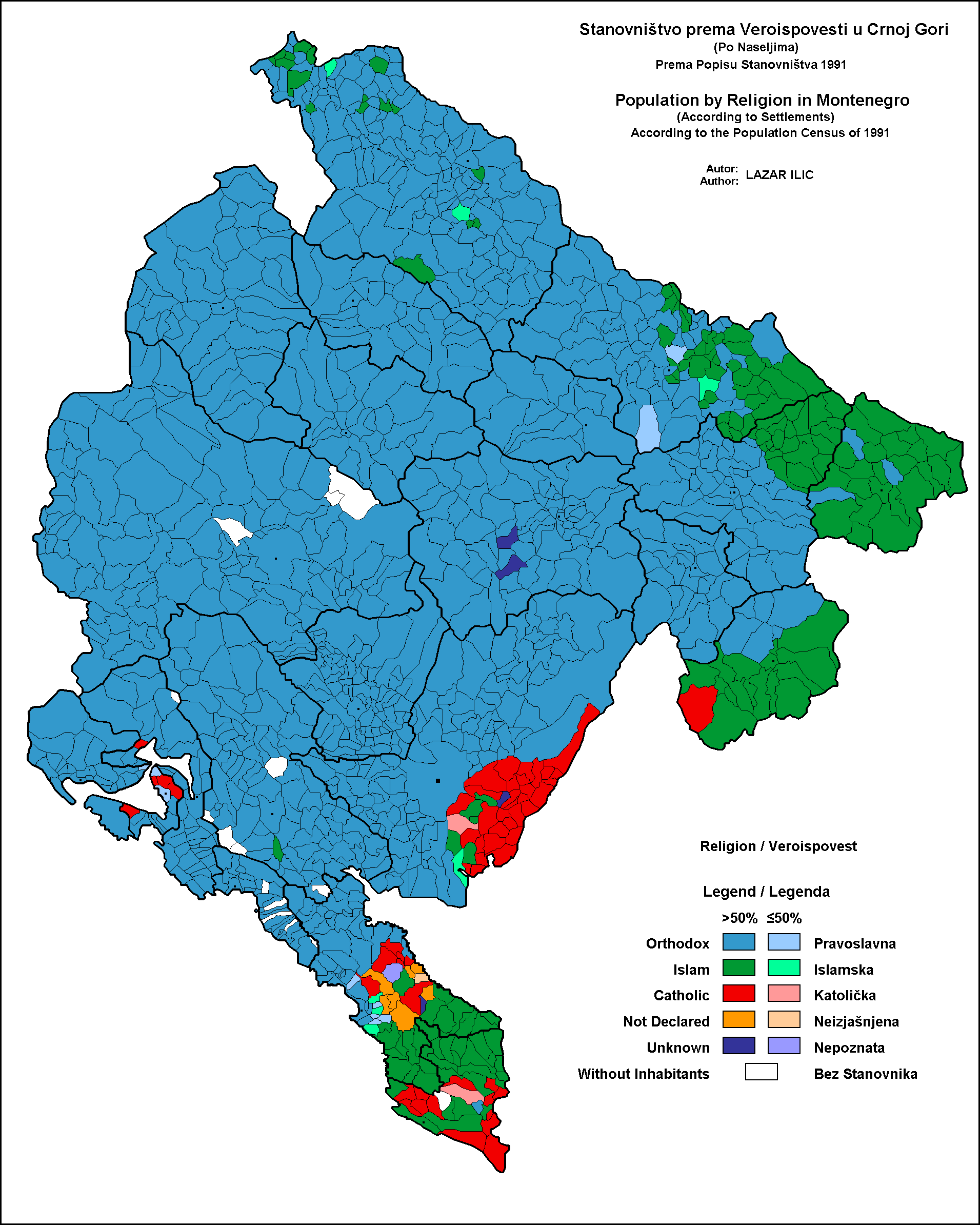 Karta veroispovesti u crnoj gori prema popisu stanovnistva iz 1991e godine. Ako imate pitanja u vezi karte mozete kontaktirati Lazara Ilica na